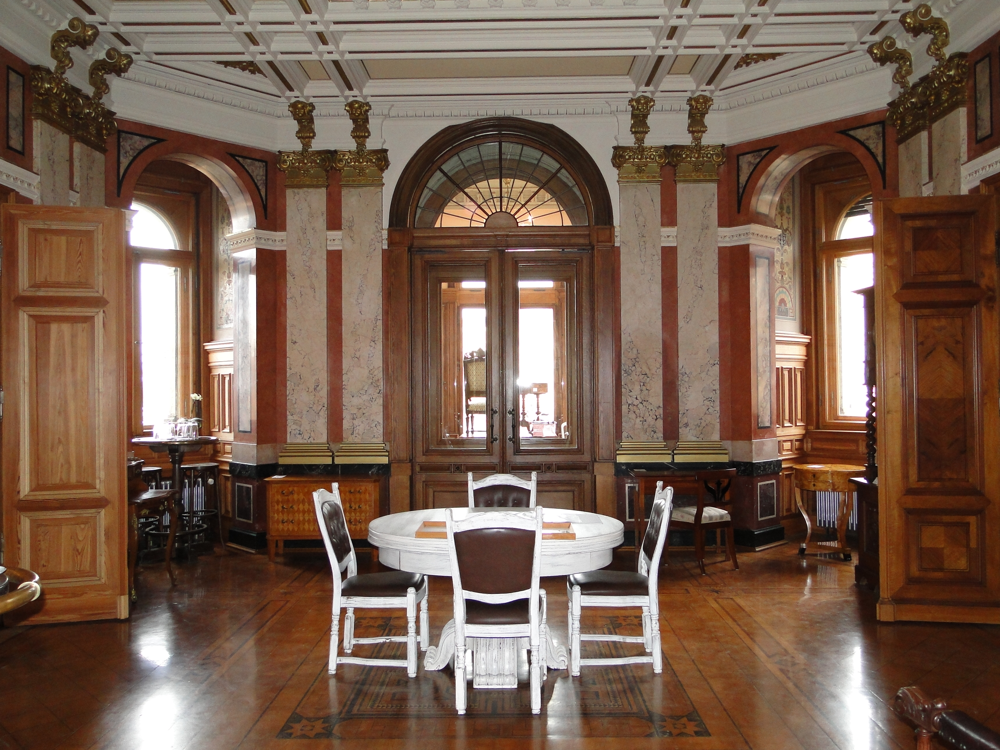 Villa Grumbt in Dresden, Diele